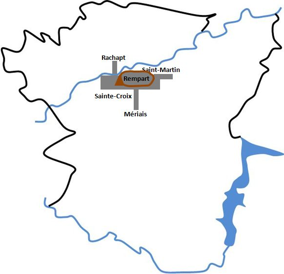 Vitré à l'époque moderne